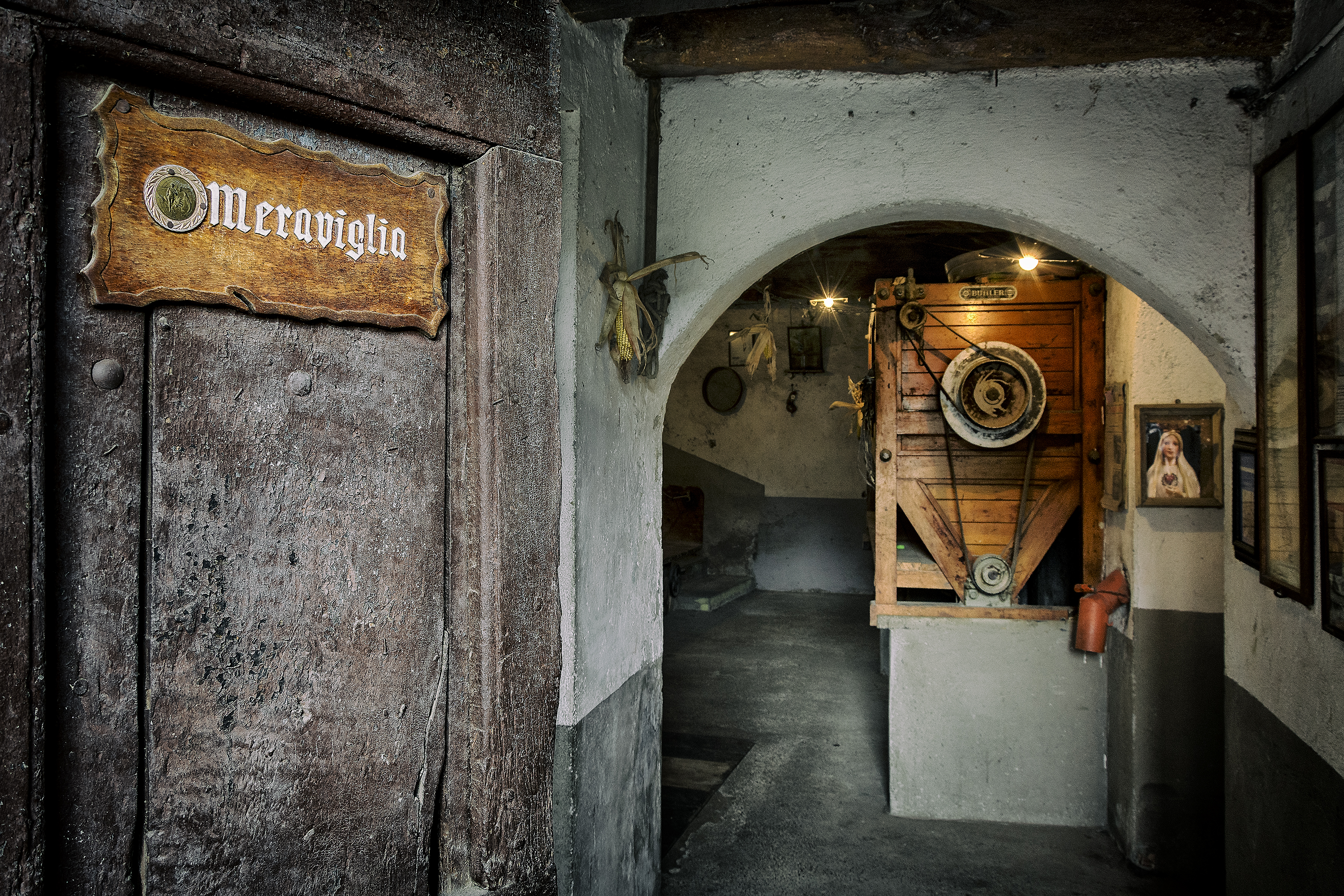 Q29886102 This is a photo of a monument which is part of cultural heritage of Italy.